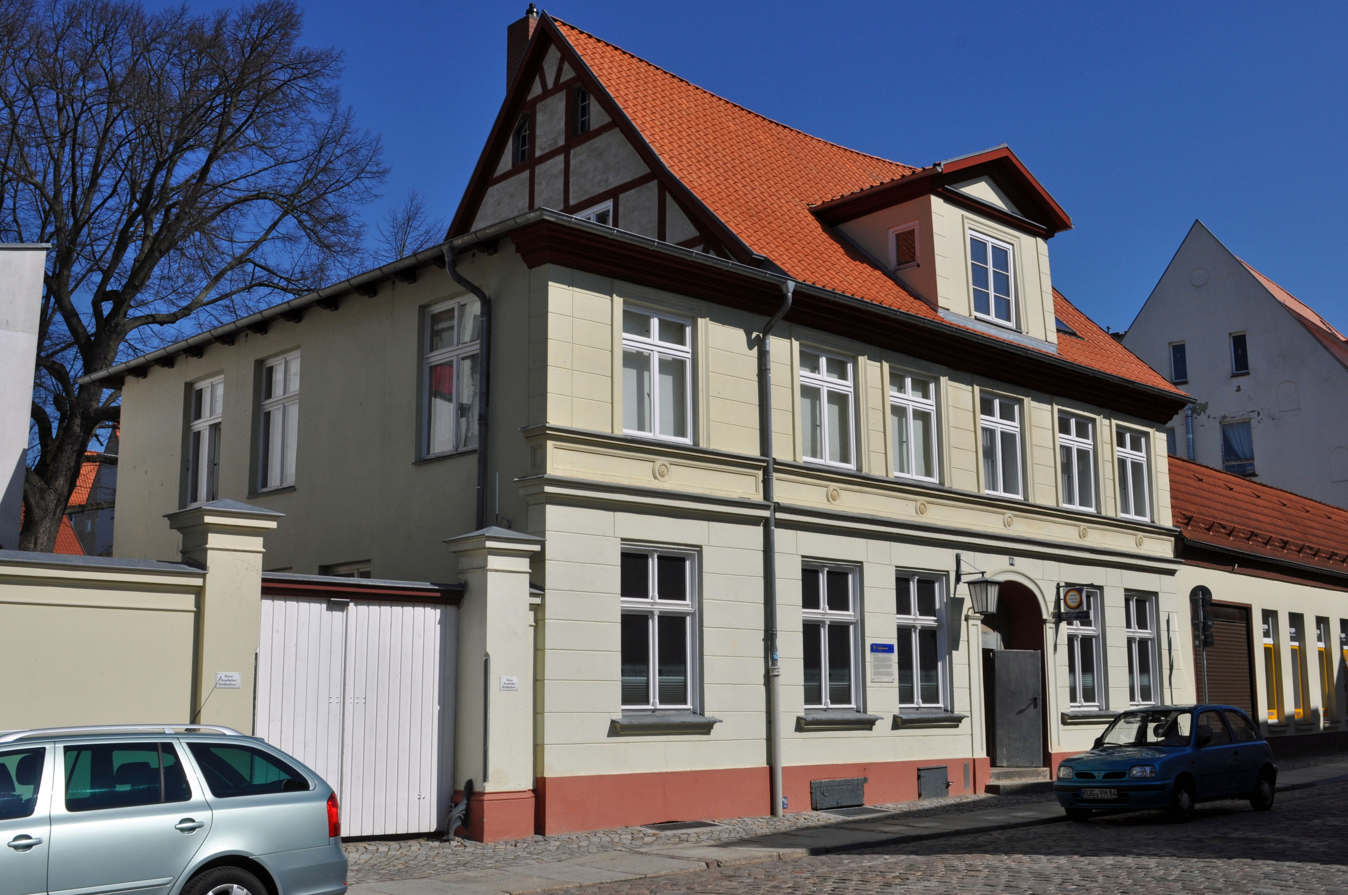 Gebäude bzw. Gebäudedetail in Stralsund. Straße und Hausnummer siehe Dateiname.